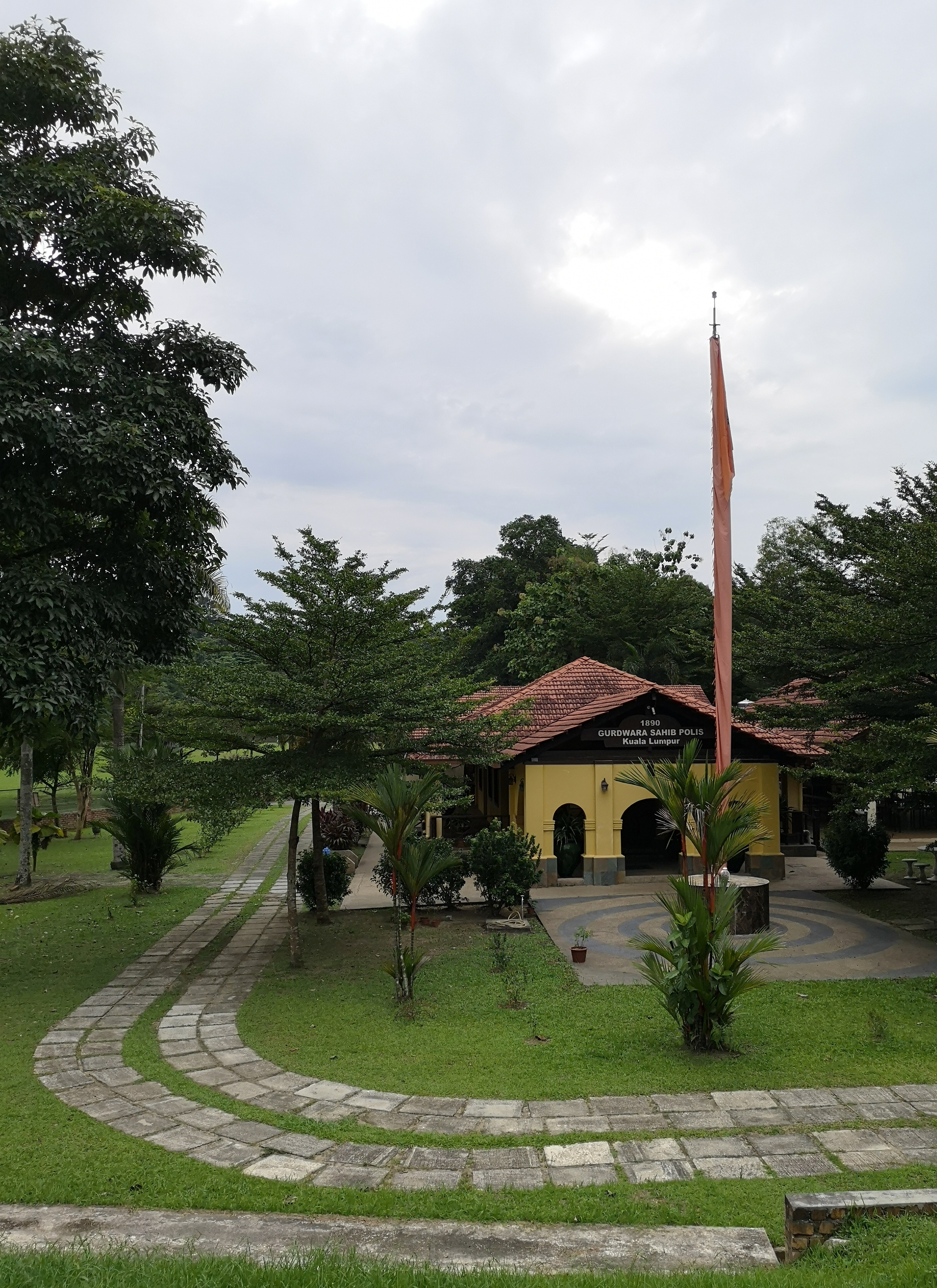 Kuala Lumpur Gurdwara Sahib Police